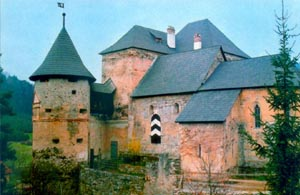 Streitwiesen 1990 (Original text : Jugenburg Streitwiesen, Quelle: Archiv Streitwiesen, Fotograf: Kaspek, Datum der Aufnahme: 1990;)